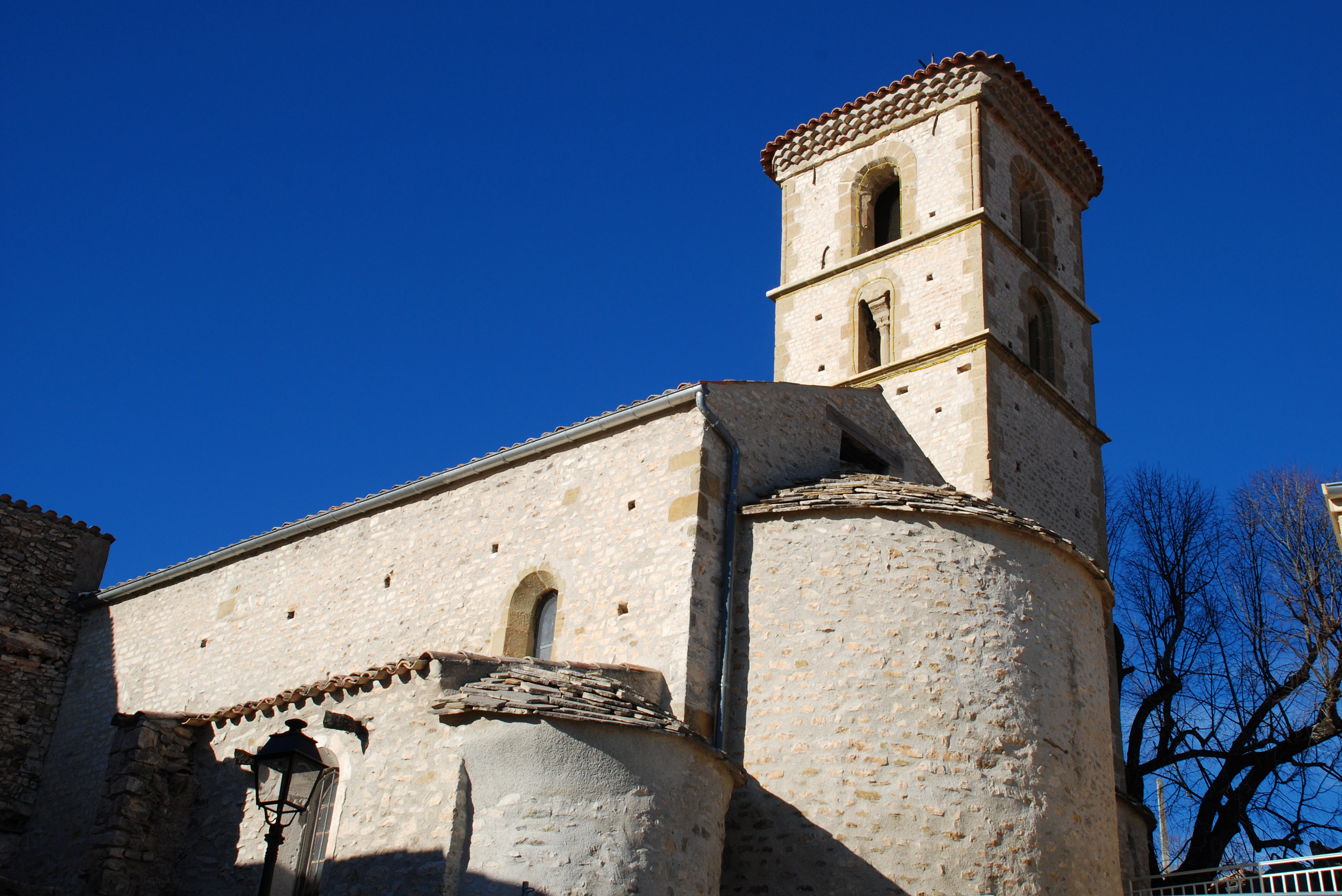 France - Provence - Église Saint-Jean-Baptiste de Mallefougasse